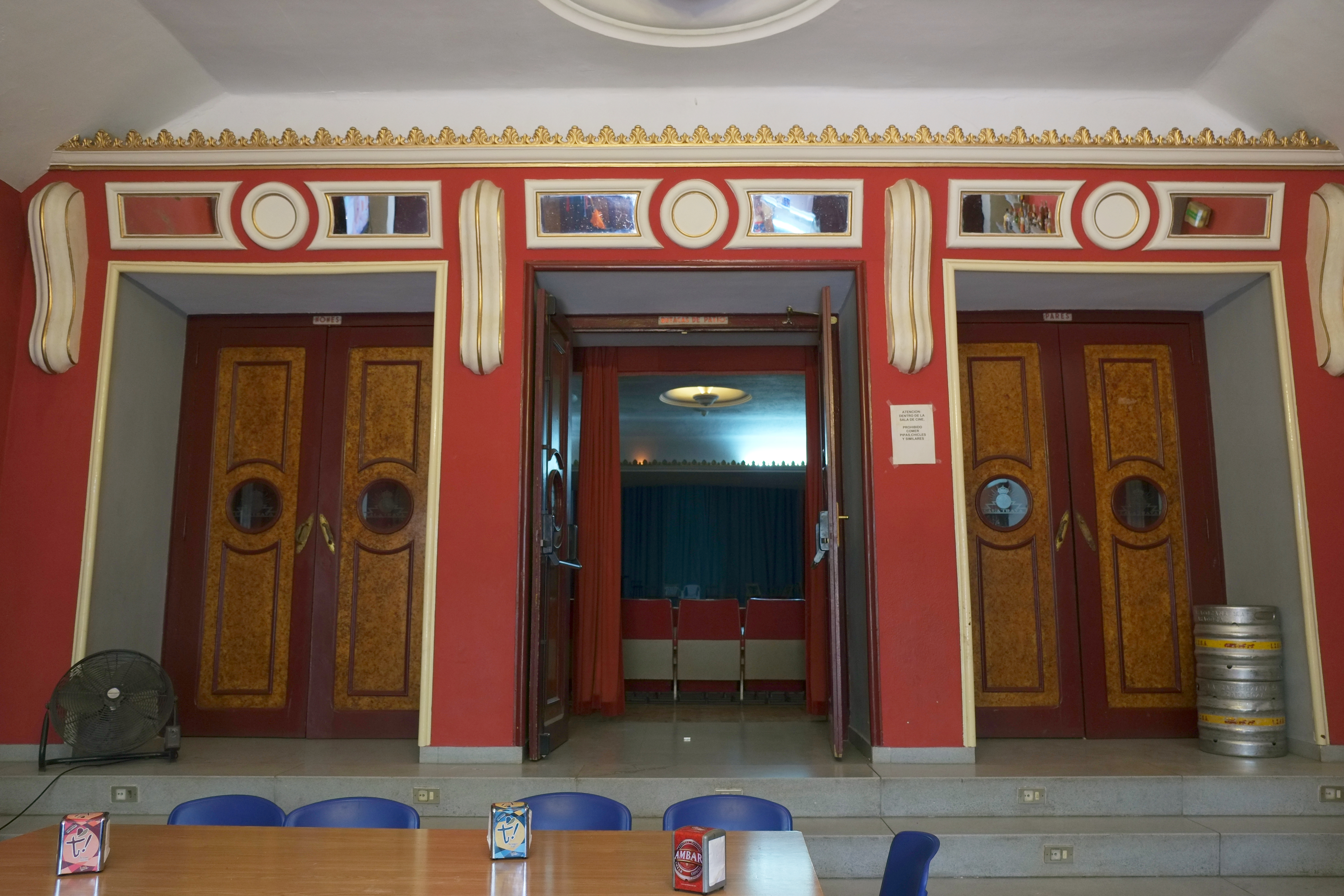 Cinema Calatrava in Fitero in Navarra (Spanien)